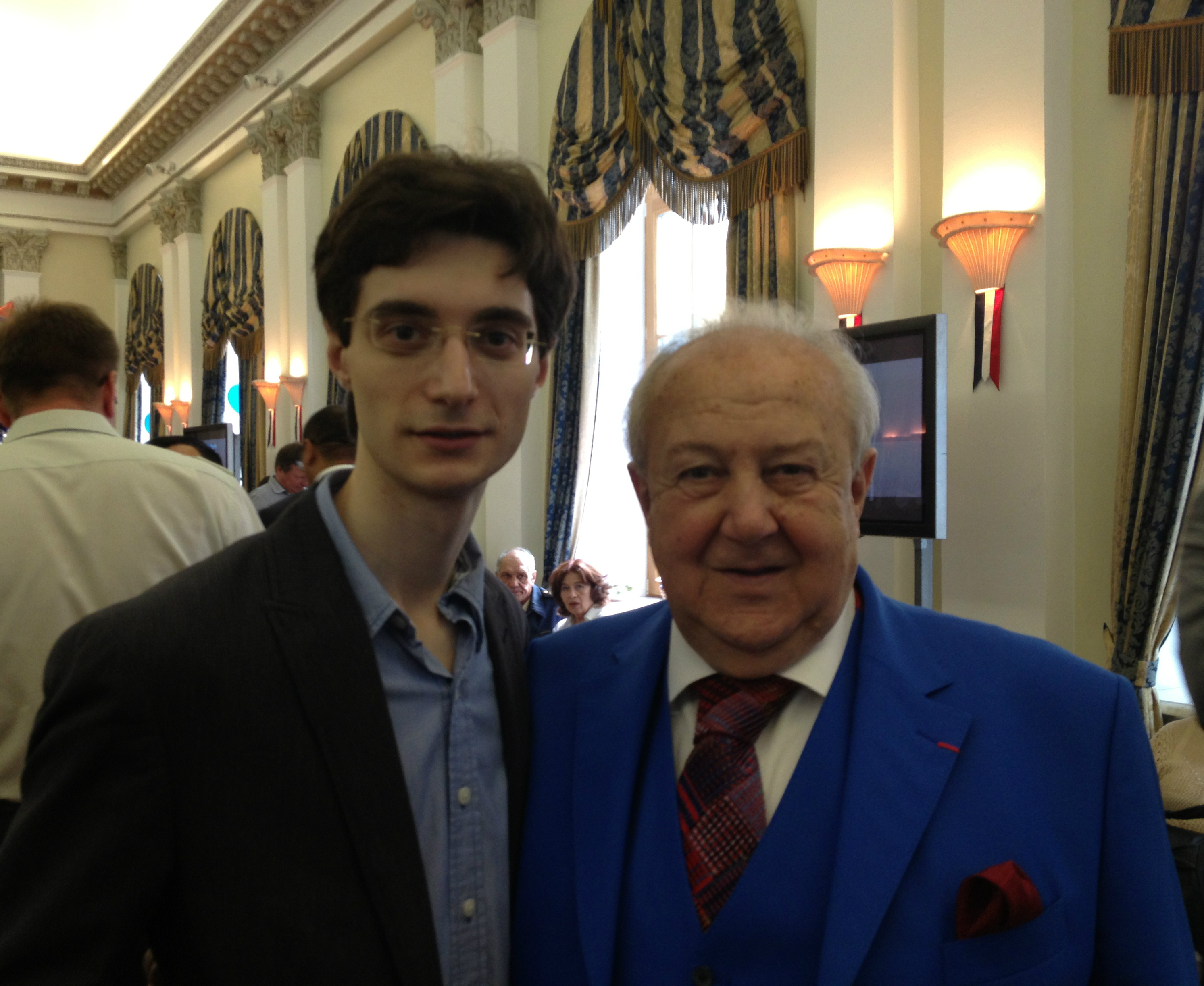 Стасс Шпанин и Зураб Церетели